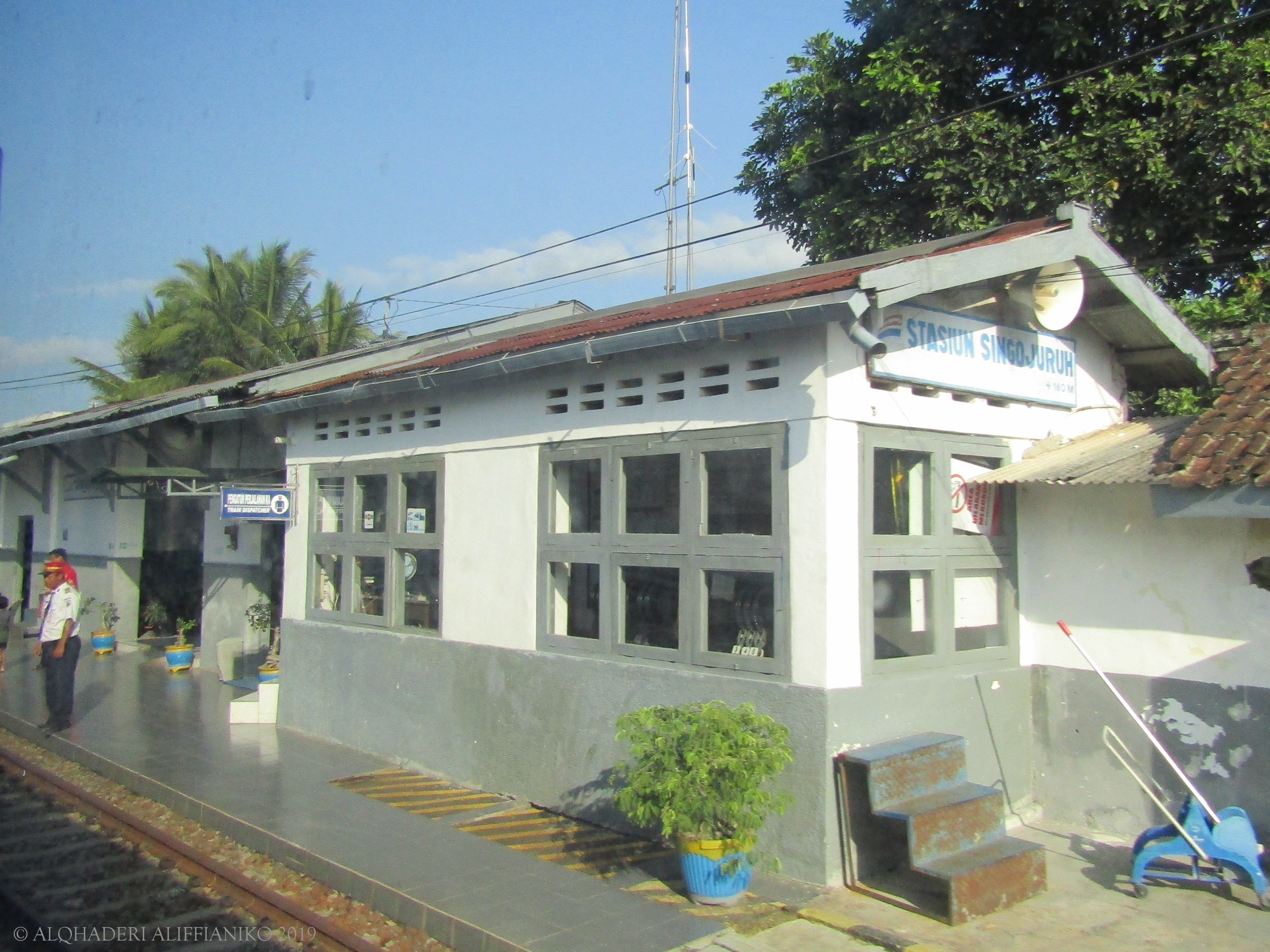 Stasiun Singojuruh, dilihat dari peron